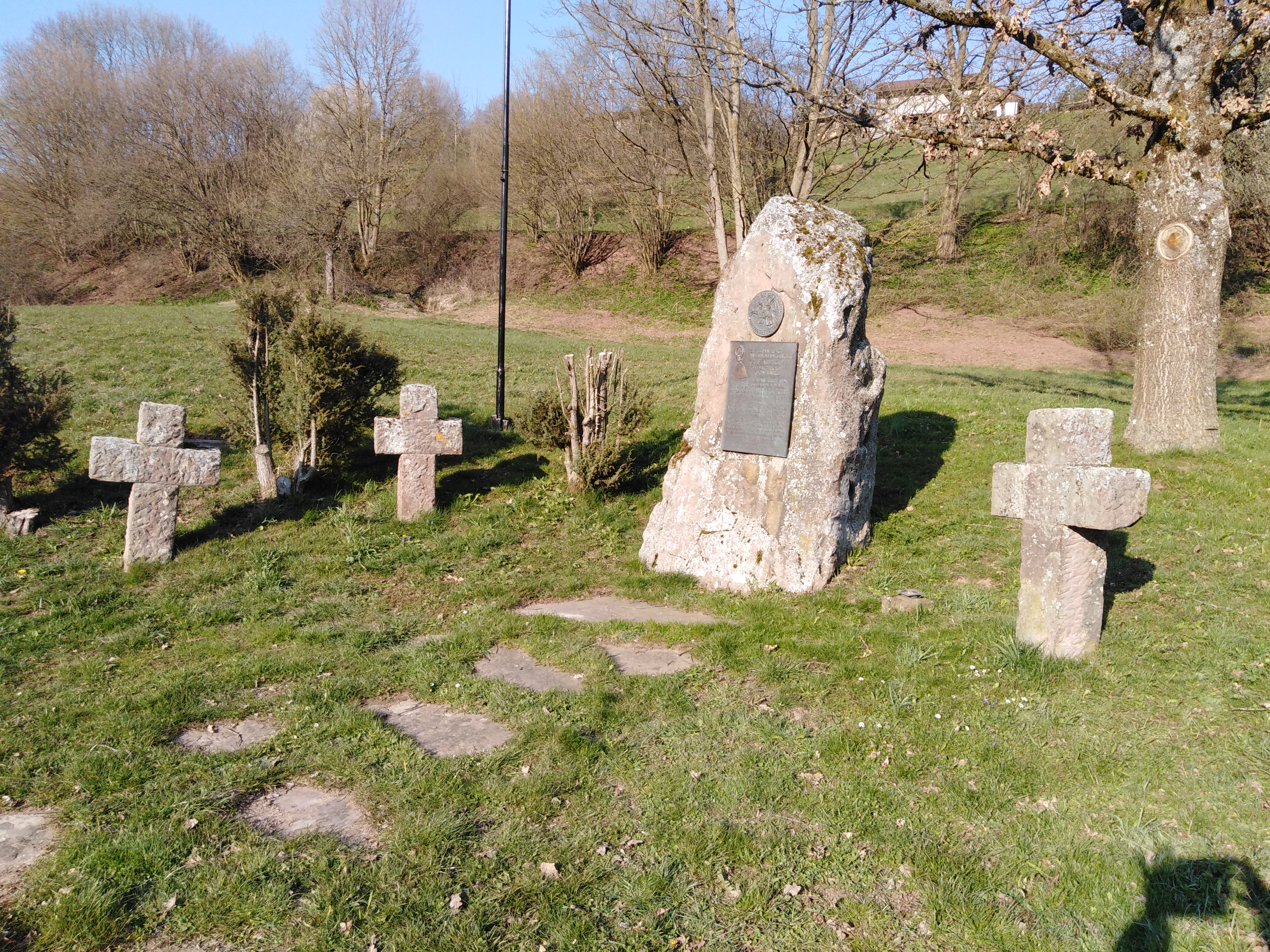 Minnesängerdenkmal Leinstetten zum Gedenken an Graf Albrecht II von Haigerloch (Hohenberg), der hier am 17. April 1289 in den Kreuzwiesen fiel